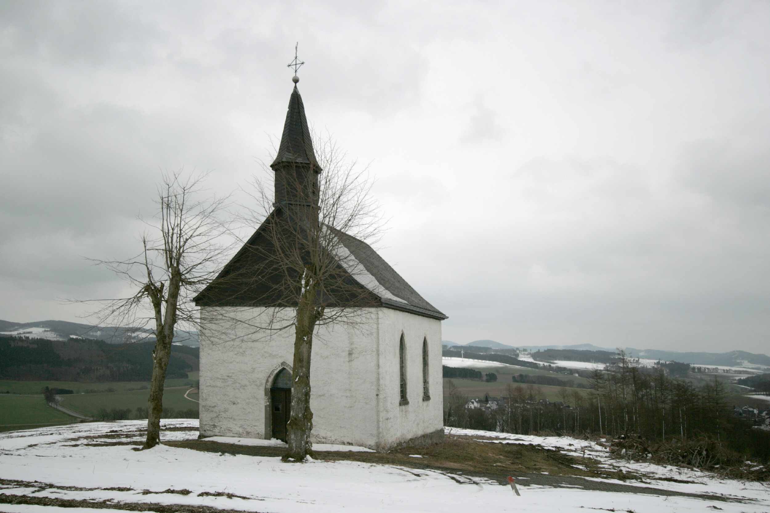 Kapelle Wormbach